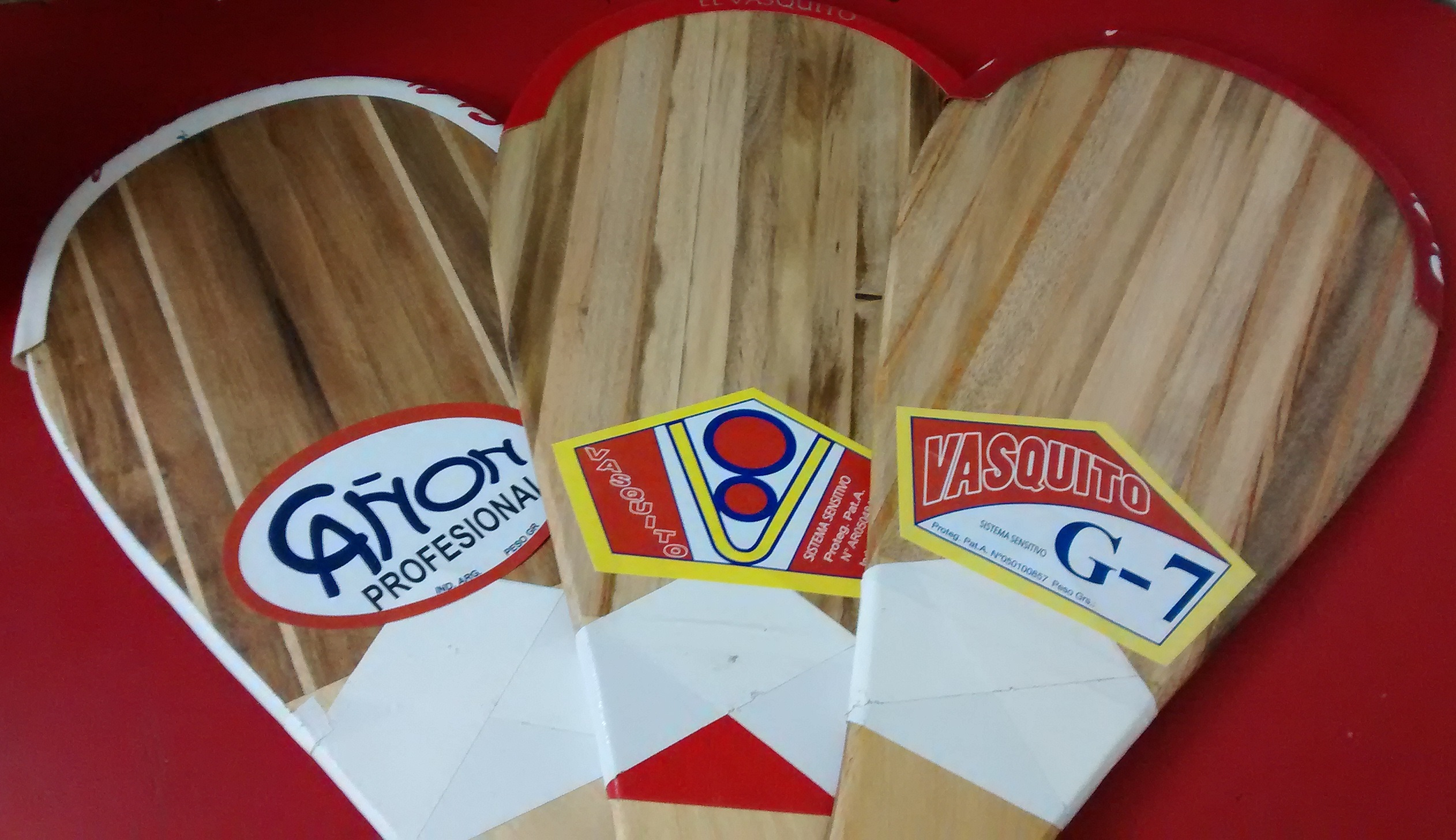 Algunos modelos de paletas argentinas Vasquito (2015)